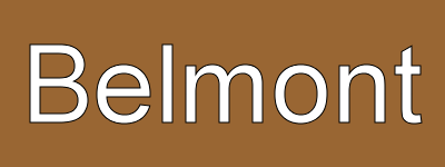 Belmont destination sign.